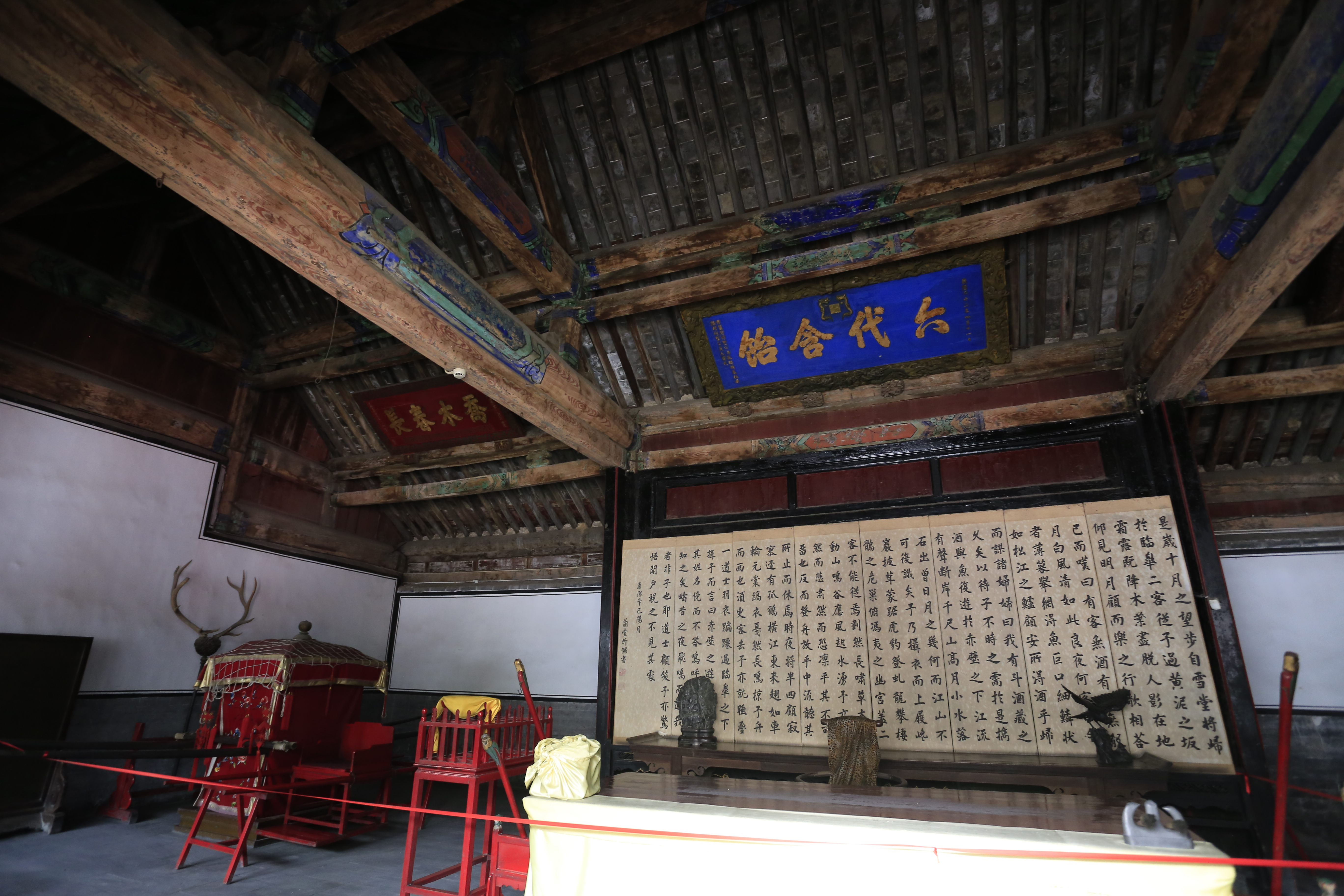 曲阜孔府—— 三堂